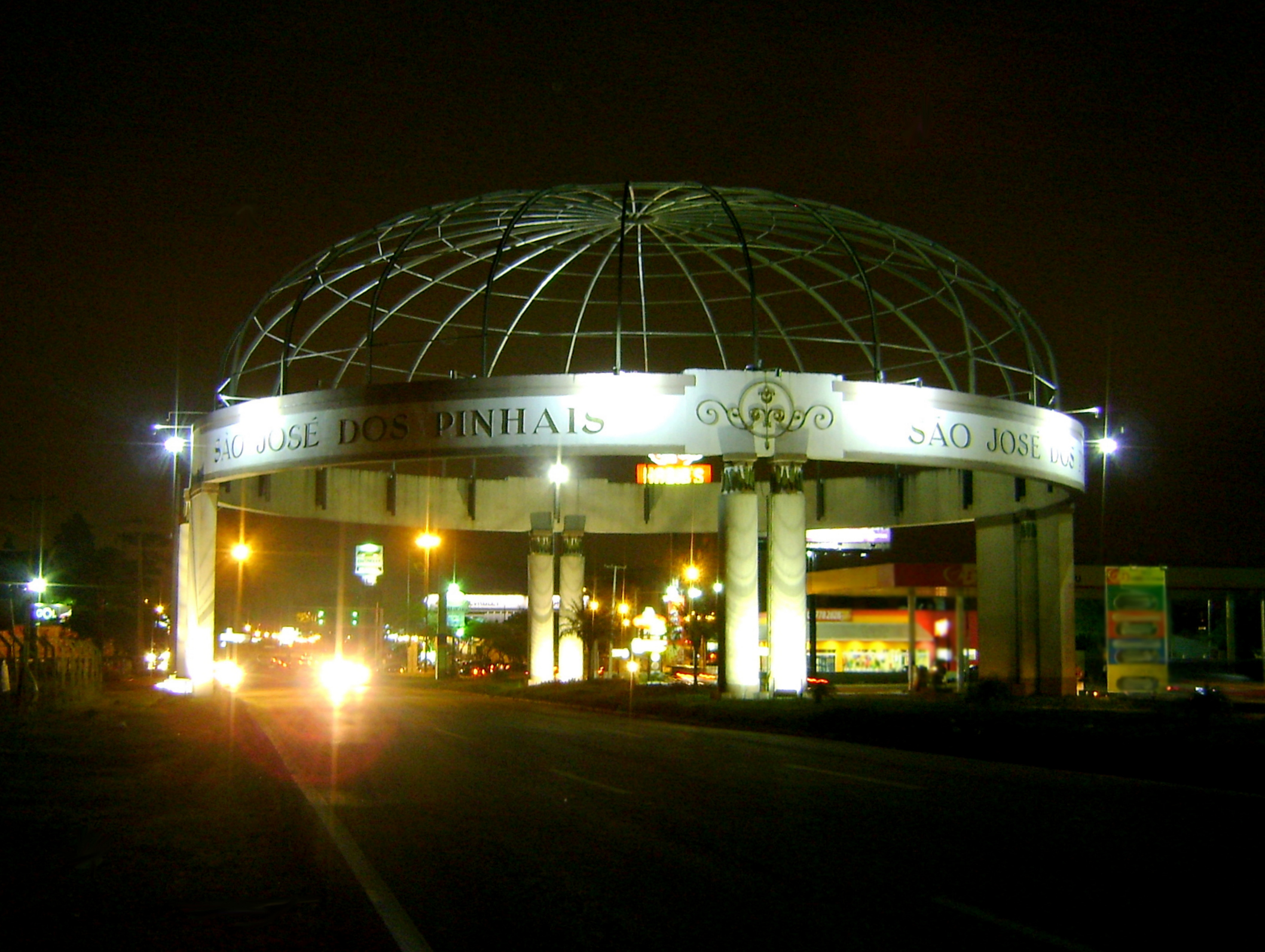 Imagem noturna do Portal de São José dos Pinhais, na divisa com Curitiba (PR). Construído em 1995, visando saudar todos aqueles que passam pelo município por terra ou pelo ar, possui doze metros de altura e trinta de diâmetro. Consiste em uma viga de concreto armado em forma circular, apoiada em quatro pontos, sobre a qual há uma estrutura de aço em forma de cúpula, além de esculturas em bloco de granito. Foi inspirado nas antigas estufas européias utilizadas para o cultivo de plantas e visa lembrar a universalidade dos povos e a integração do Mercosul – a globalização. Engenheiro arquiteto: Mário César Siqueira Campos; engenheiro responsável: Dr. Ricardo Fedalto.